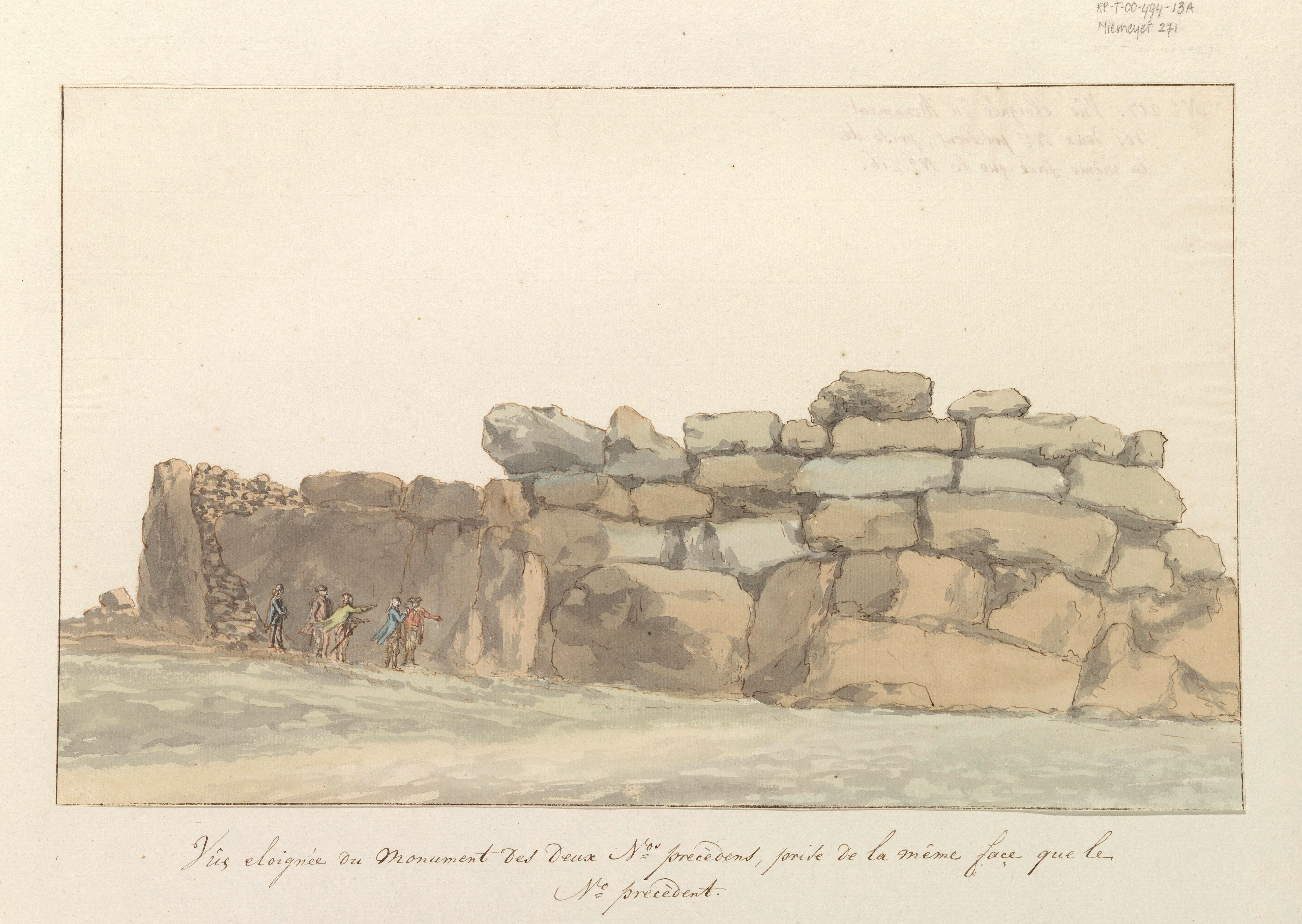 IdentificatieTitel(s): Panorama met monument van Feniciërs of Carthagen op eiland GozoVue éloignée du monument des deux Nos. précédens, prise de la même face que le No. précédent (titel op object)Voyage en Italie, en Sicile et à Malte - 1778 (serietitel)Objecttype: tekening aquarel Objectnummer: RP-T-00-494-13ACatalogusreferentie: Niemeijer&De Booy 271Opschriften / Merken: opschrift, verso linksboven, handgeschreven: ‘No 217 Vue éloignée du monument des deux Nos. précédens, prise de la même face que le No. précédent’Omschrijving: Tekening uit het album 'Voyage en Italie, en Sicile et à Malte', 1778.VervaardigingVervaardiger: tekenaar: Louis DucrosDatering: 1778Fysieke kenmerken: zwart krijt, aquarel en penseel in grijs, pen in bruinMateriaal: papier krijt waterverf Techniek: penseel / penAfmetingen: blad: h 232 mm × b 380 mmVerwerving en rechtenCredit line: Schenking van mevrouw Hansen-van den Brugghen, Den HaagVerwerving: schenking 1948Copyright: Publiek domein